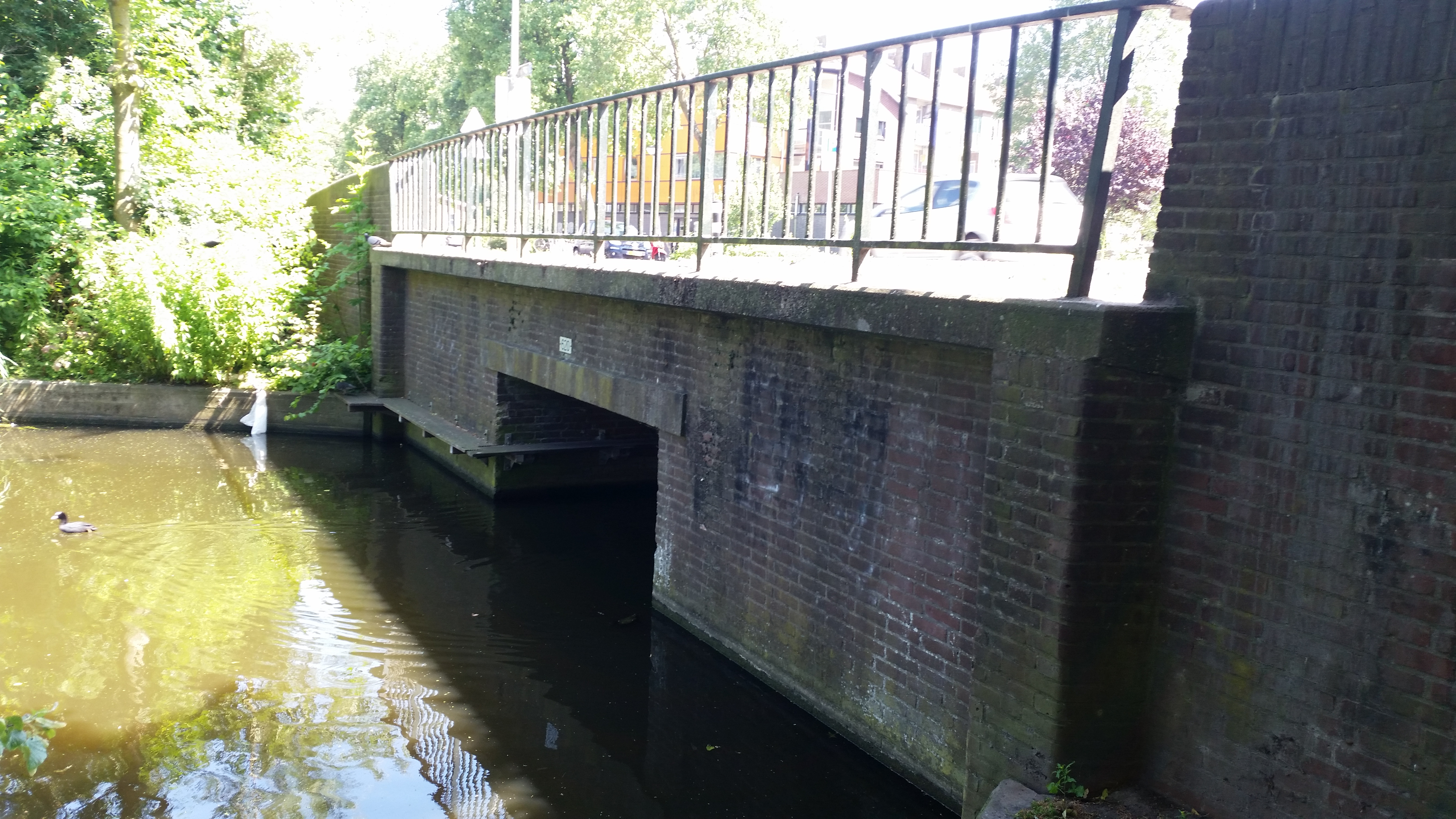 Brug 620, Maria Woesthovenbrug, in de Lodewijk van Deysselstraat, de leuning boven overspanning